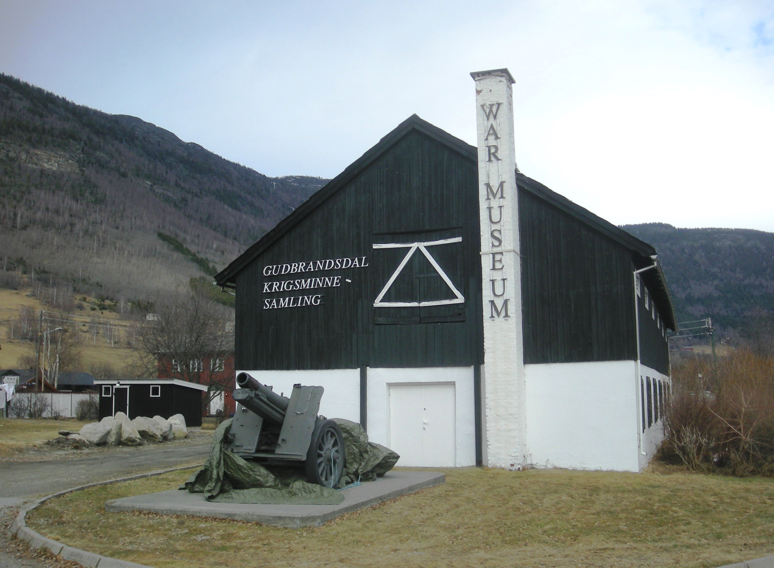 Gudbrandsdal krigsminnesamling på Kvam i Nord-Fron